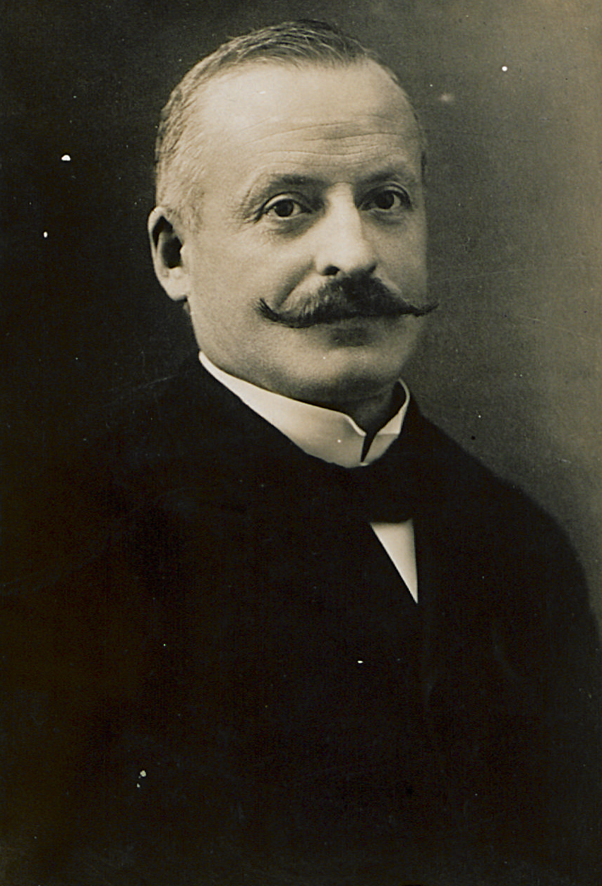 Giuseppe Motta, Bundespräsident der Schweiz